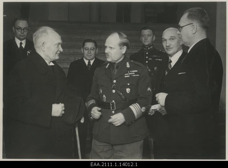 Riigivanem K.Päts lahkub kooliõpetajate päevalt (1936)